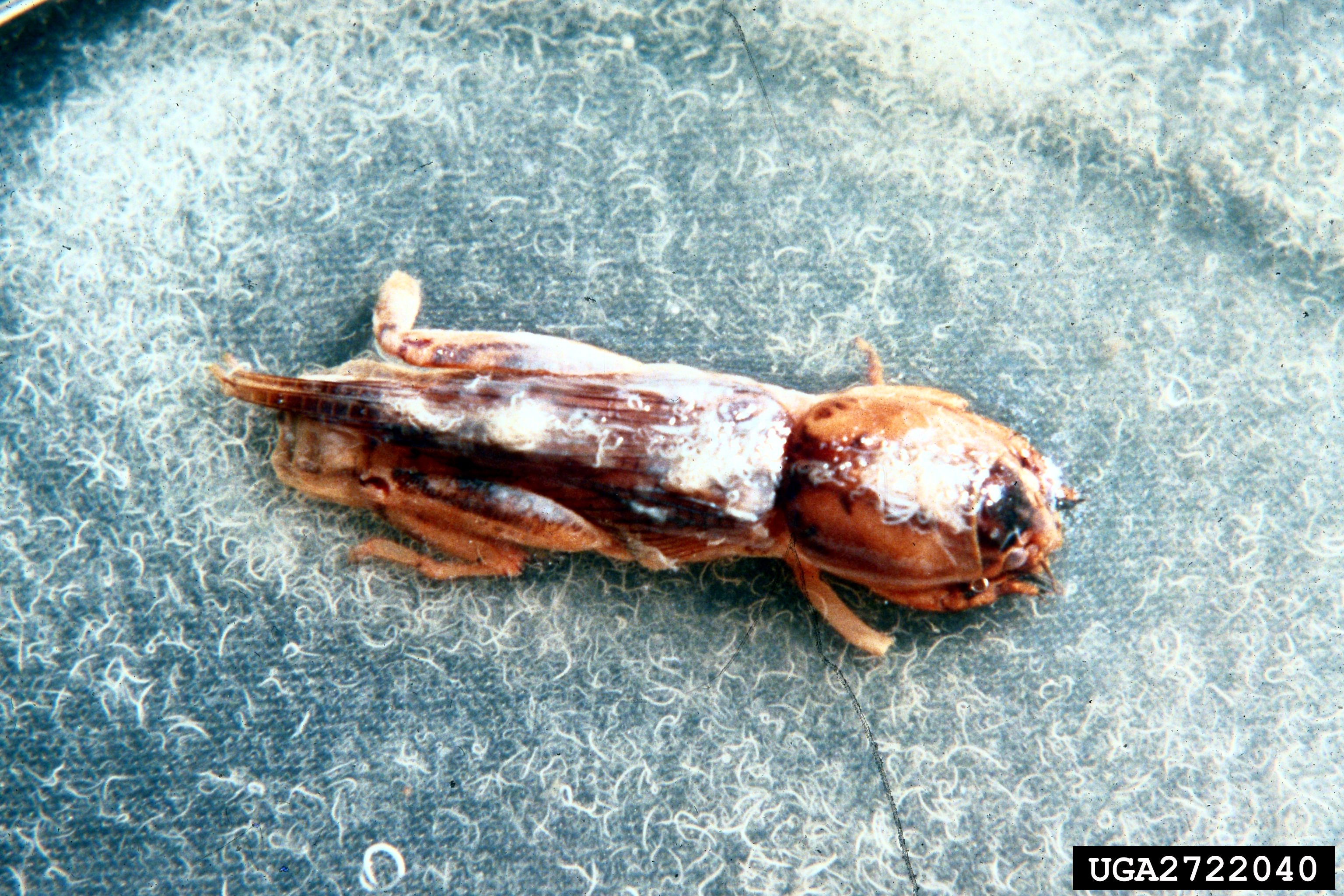 with Steinernema scapterisci nematodes emerging at Scapteriscus vicinus